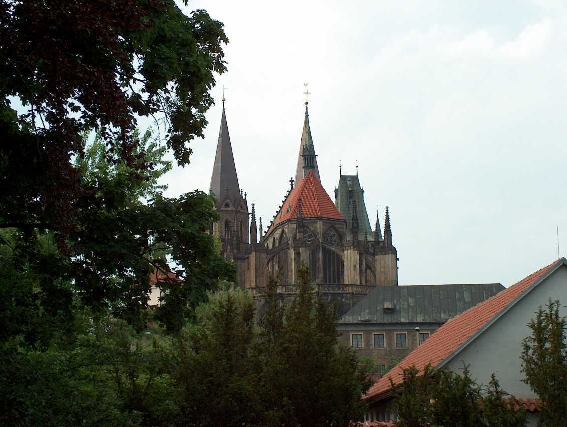 Kolín, chrám sv. Bartoloměje